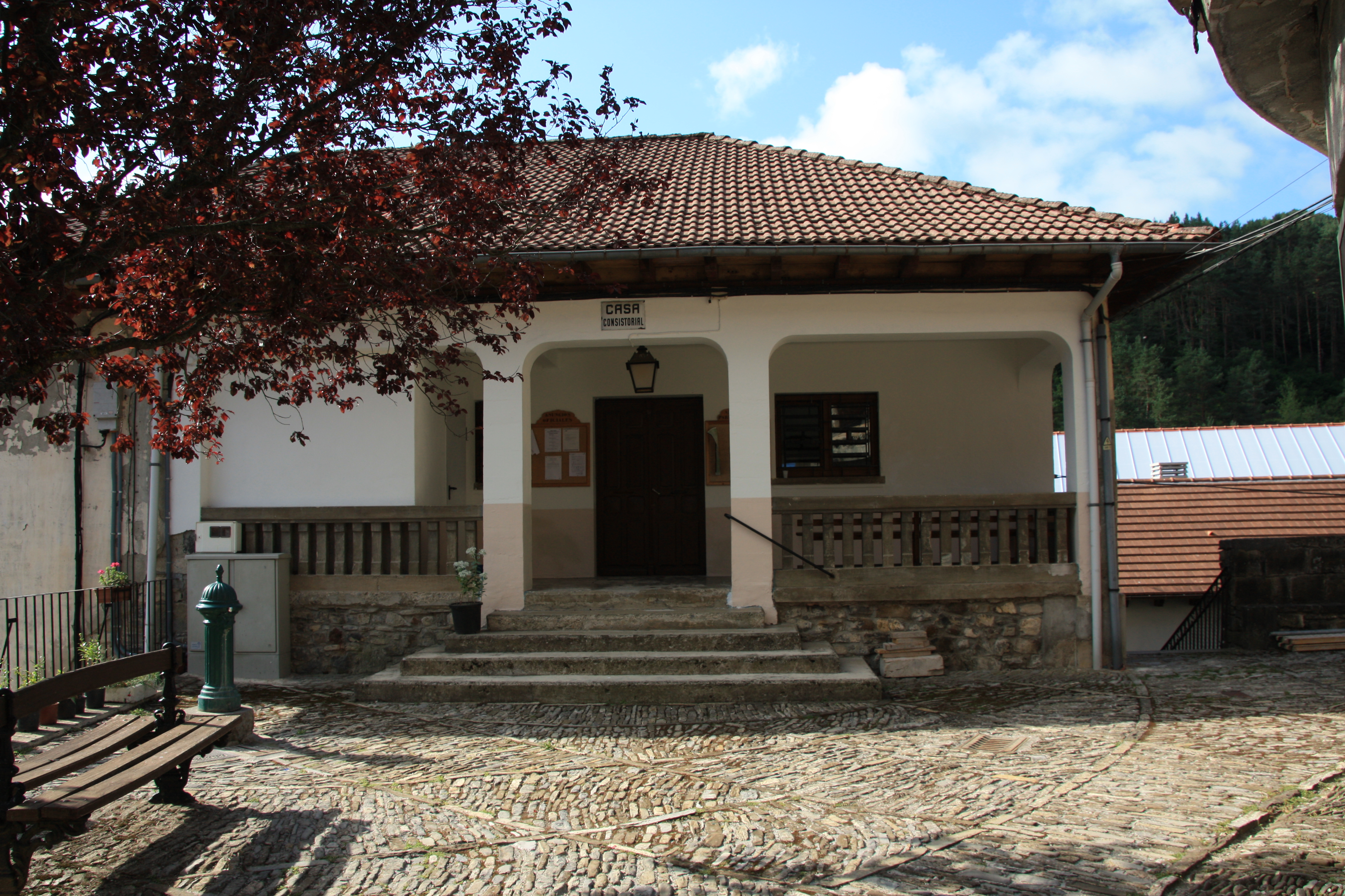 Uztarrozeko udaletxea.